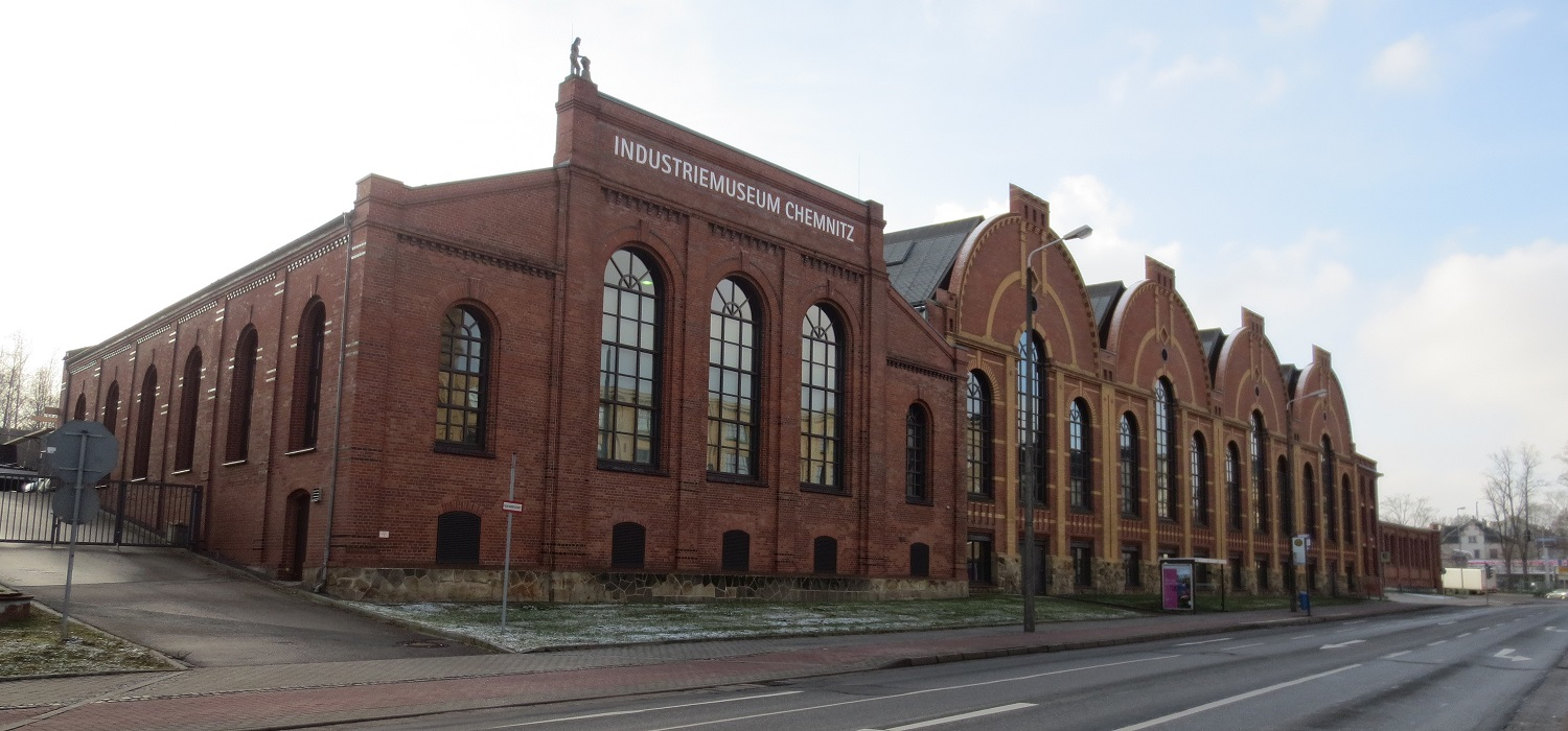 Ehemalige Gießerei und Werkzeugmaschinenfabrik an der Kappler Drehe. Heute ein Industriemuseum, Chemnitzer Geschichte. Gesamt-Kulturdenkmal Chemnitz Kapellenberg. Ansicht: Zwickauer-Straße/Vorderseite.